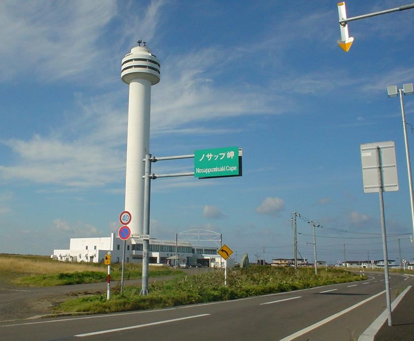 Hokkaido pref road No.35 near Nossapu Cape, Nemuro, Hokkaido, Japan 北海道道35号根室半島線 納沙布岬附近（北海道根室市）